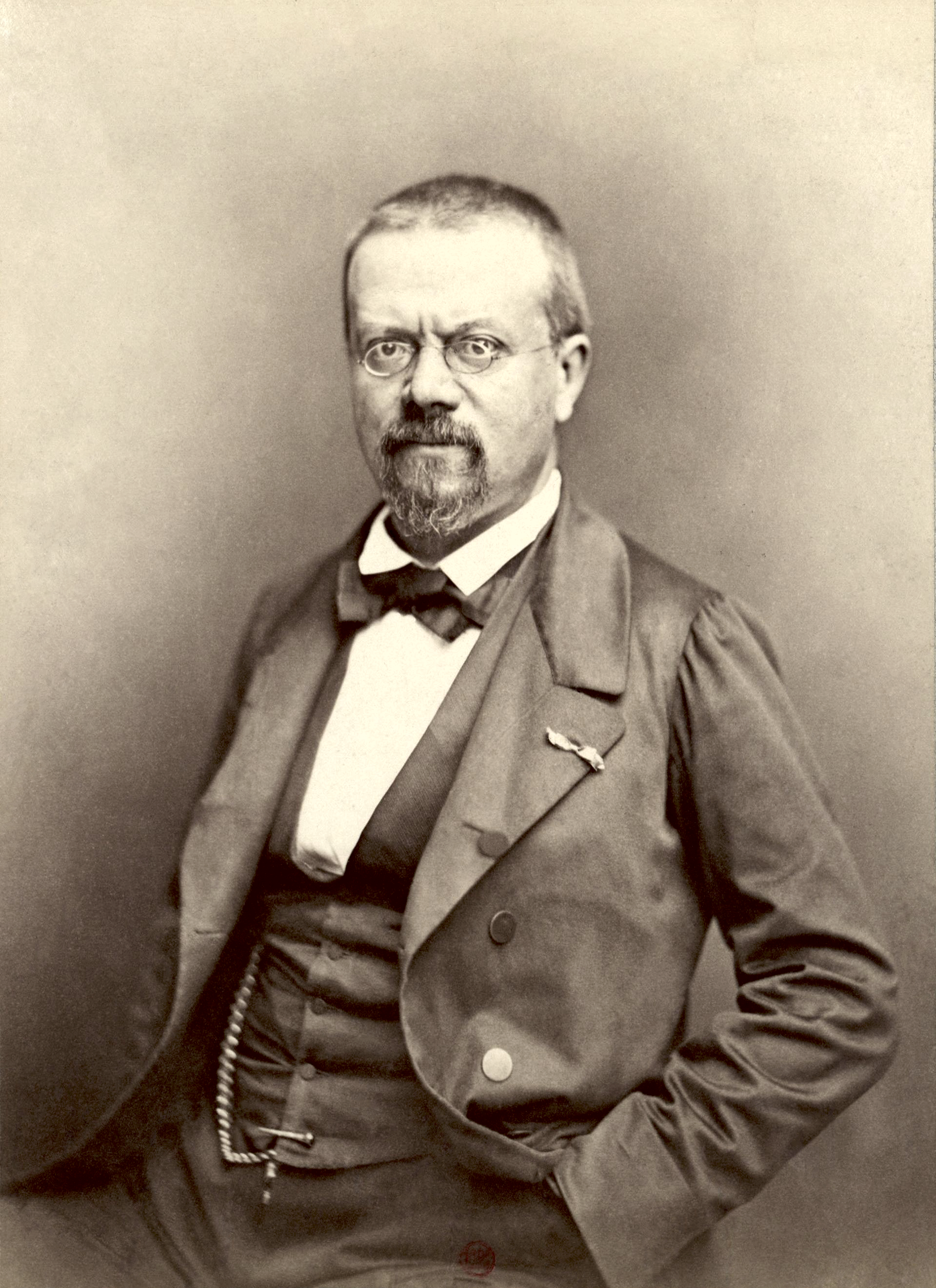 Portrait photographique de Clairville (1811–1879), comédien, poète, chansonnier, goguettier et auteur dramatique français par Nadar.